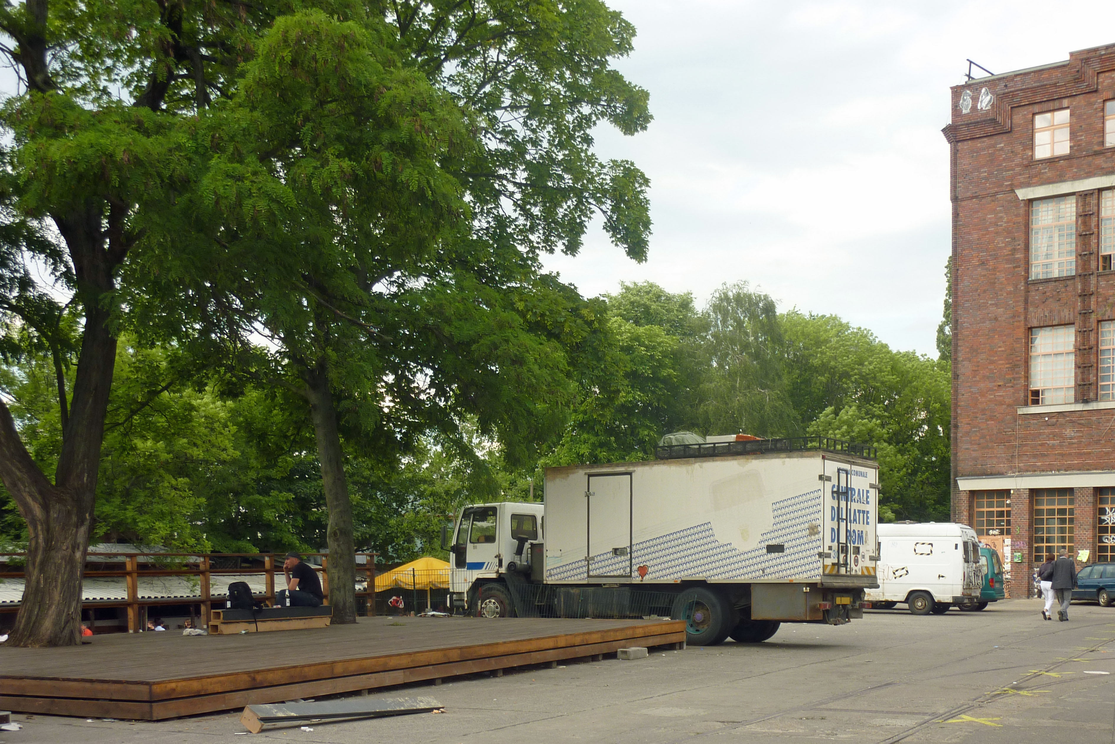 Am Flutgraben in Berlin-Alt-Treptow. Blickrichtung Norden.